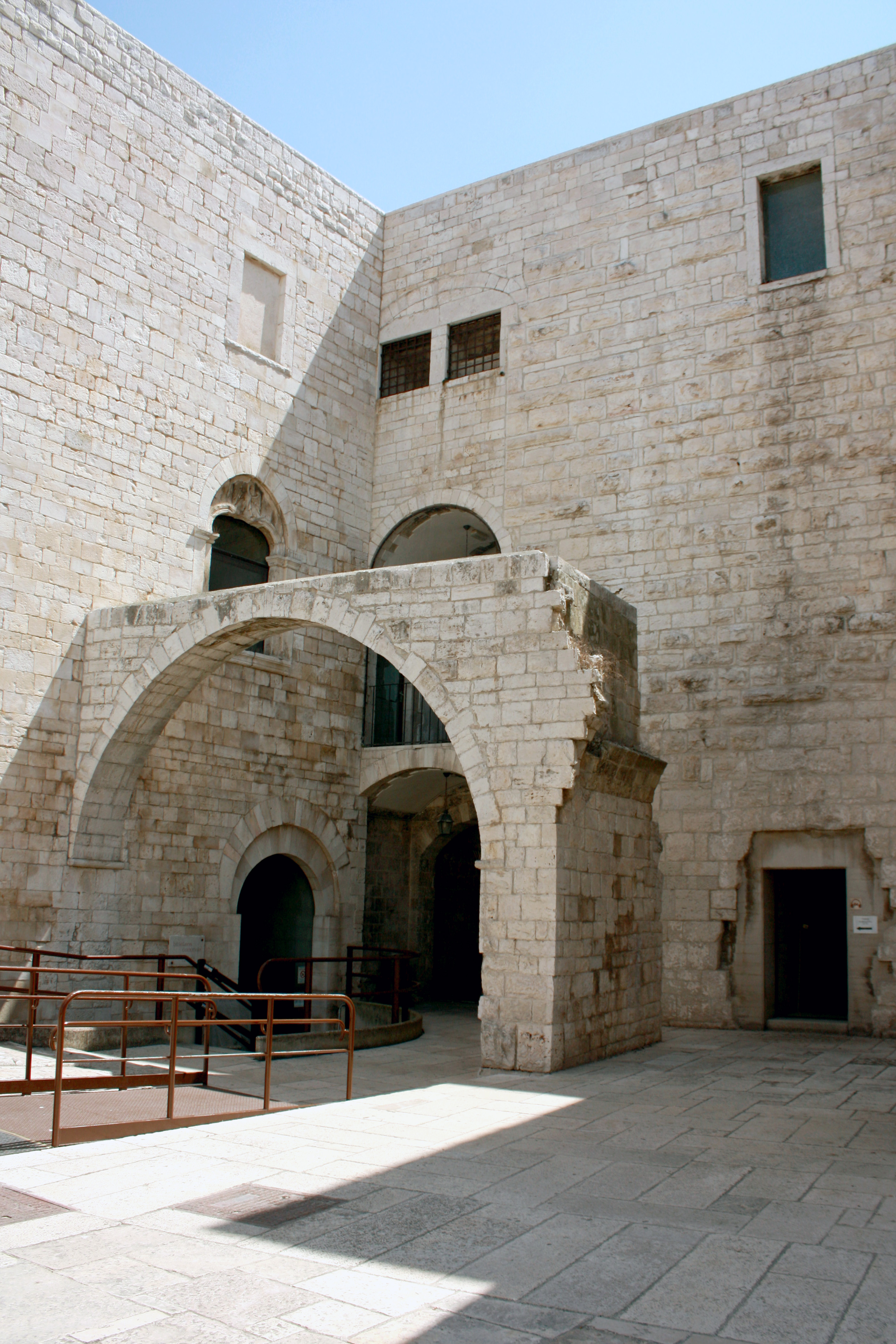 Castello di Barletta - Arco mozzato tra il fronte sud e quello est (svevo). A destra l'ingresso dal cortile alla torre normanna.